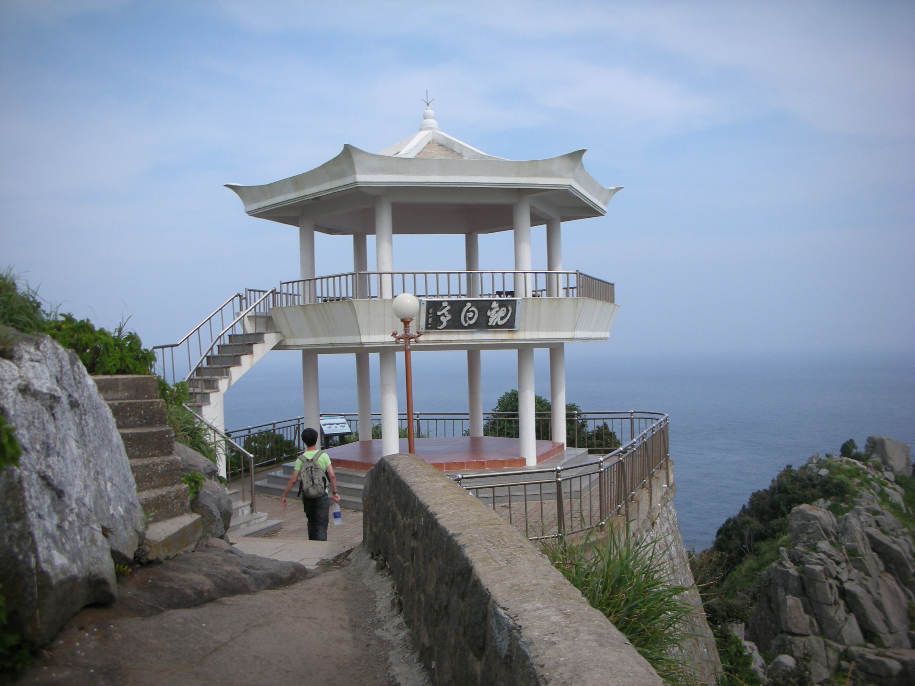 Geomundo 1